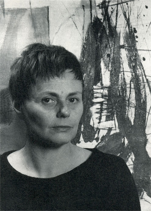 Porträt der Künstlerin Irma Hünerfauth